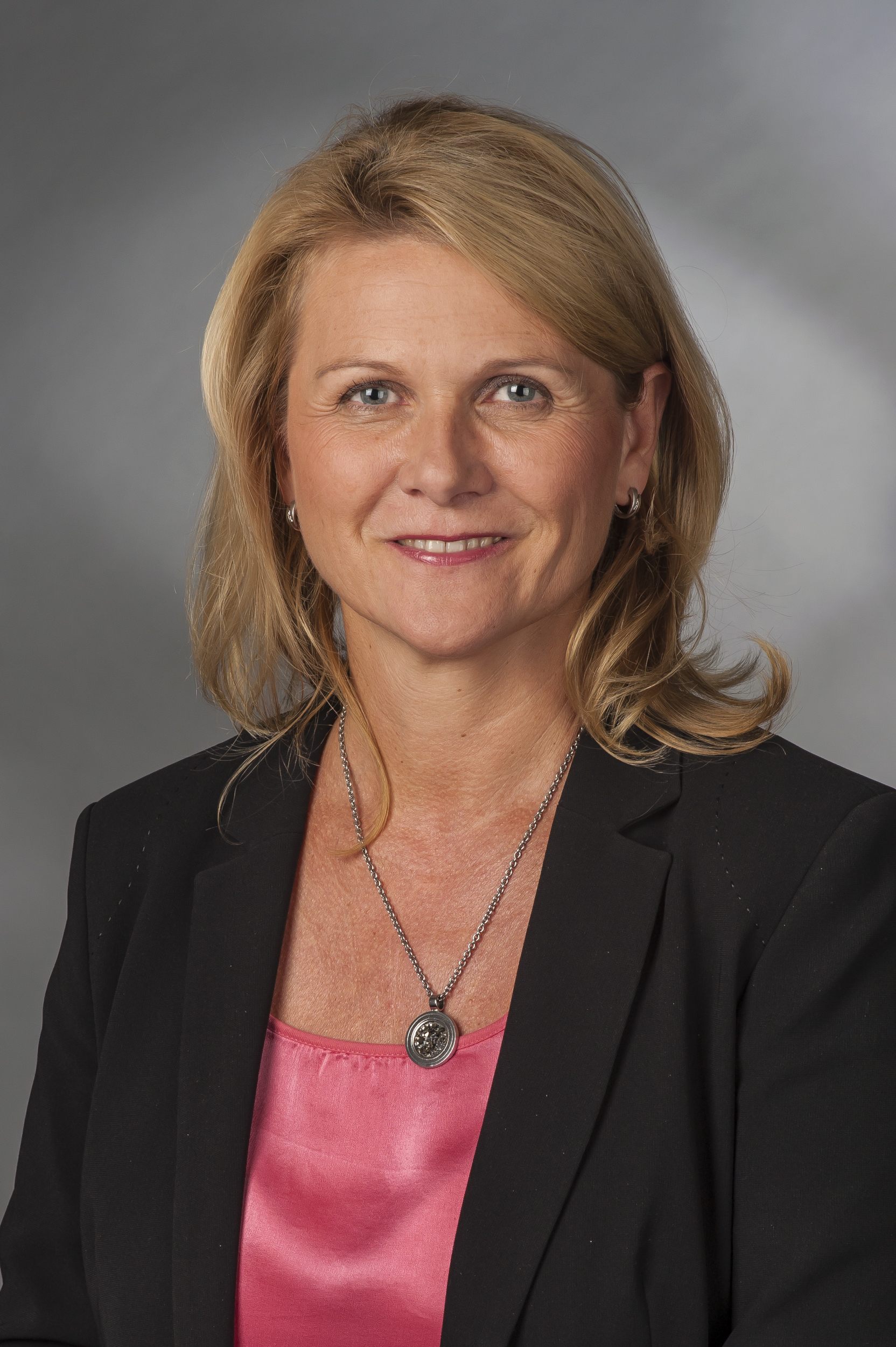 Sabine Poschmann (* 4. Oktober 1968 in Castrop-Rauxel) ist eine deutsche Politikerin (SPD) und Abgeordnete im 18. Deutschen Bundestag für den Bundestagswahlkreis Dortmund II.